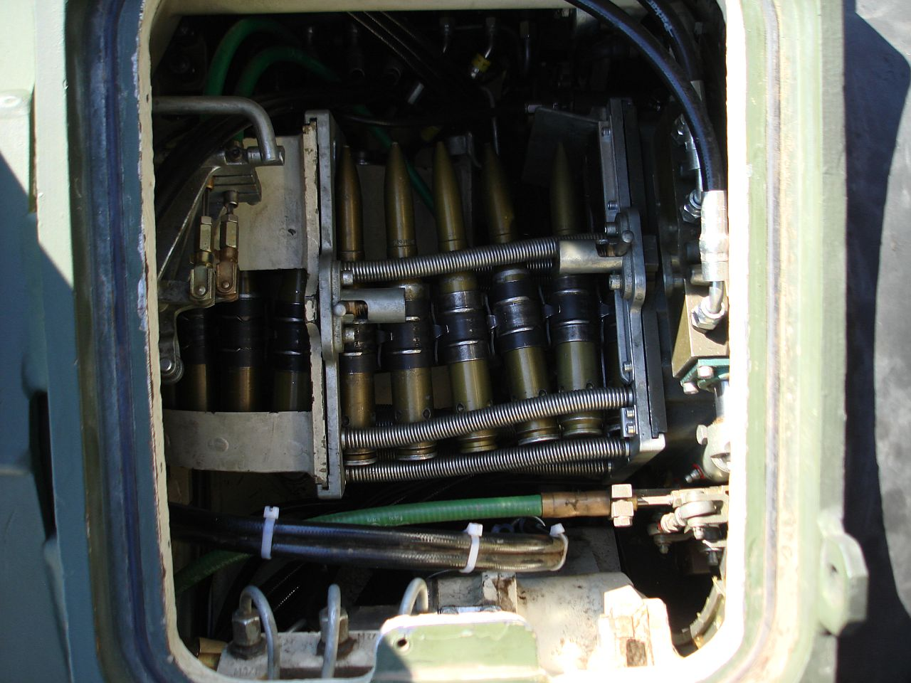 Doppelgurtzuführer (rechts) der Waffenanlage des Marder 1A3. Er hat die Aufgabe, die Munitionszufuhr zum Verschluss der Maschinenkanone zu regeln. Das heißt, dass der Richtschütze per Knopfdruck zwischen 2 Munitionssorten wählen kann. Wird die Munitionssorte geändert, so rutscht der DGZ auf einer Schiene in die nächste Position und gibt die Munition an den Verschluss weiter.